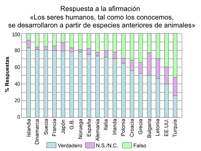 Respuesta a la afirmación «Los seres humanos, tal como los conocemos, se desarrollaron a partir de especies anteriores de animales»